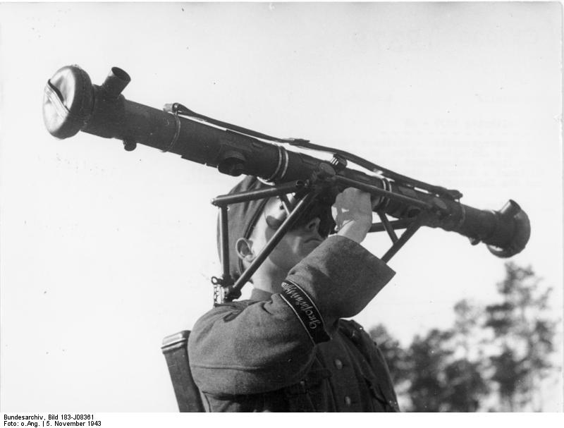 Zentralbild II. Weltkrieg 1939-45 Die Panzergrenadier - Division "Großdeutschland" wurde 1942 als eine mit allen Waffen umgerüstete Formation aus dem ehemaligen Wachregiment- Berlin, dem Infanterie-Lehr-Regiment-Döberitz, dem Infanterie-Regiment 92 (vollmot) und dem Infanterie-Regiment-Großdeutschland aufgestellt. U.B.z: Entfernungsmesser einer Vierlingsflak. 5.11.1943